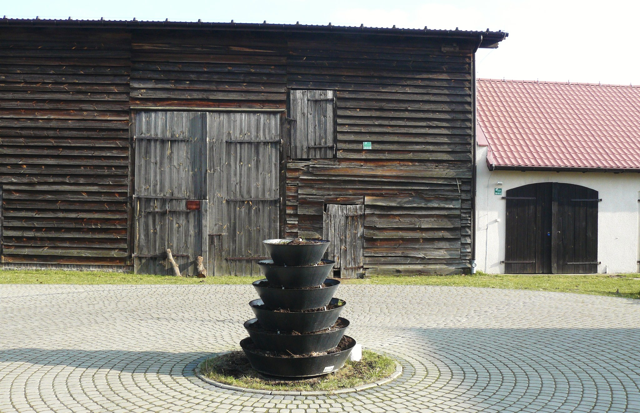 Leśny Ogród Edukacyjny w Bucharzewie - Nadl. Sieraków.